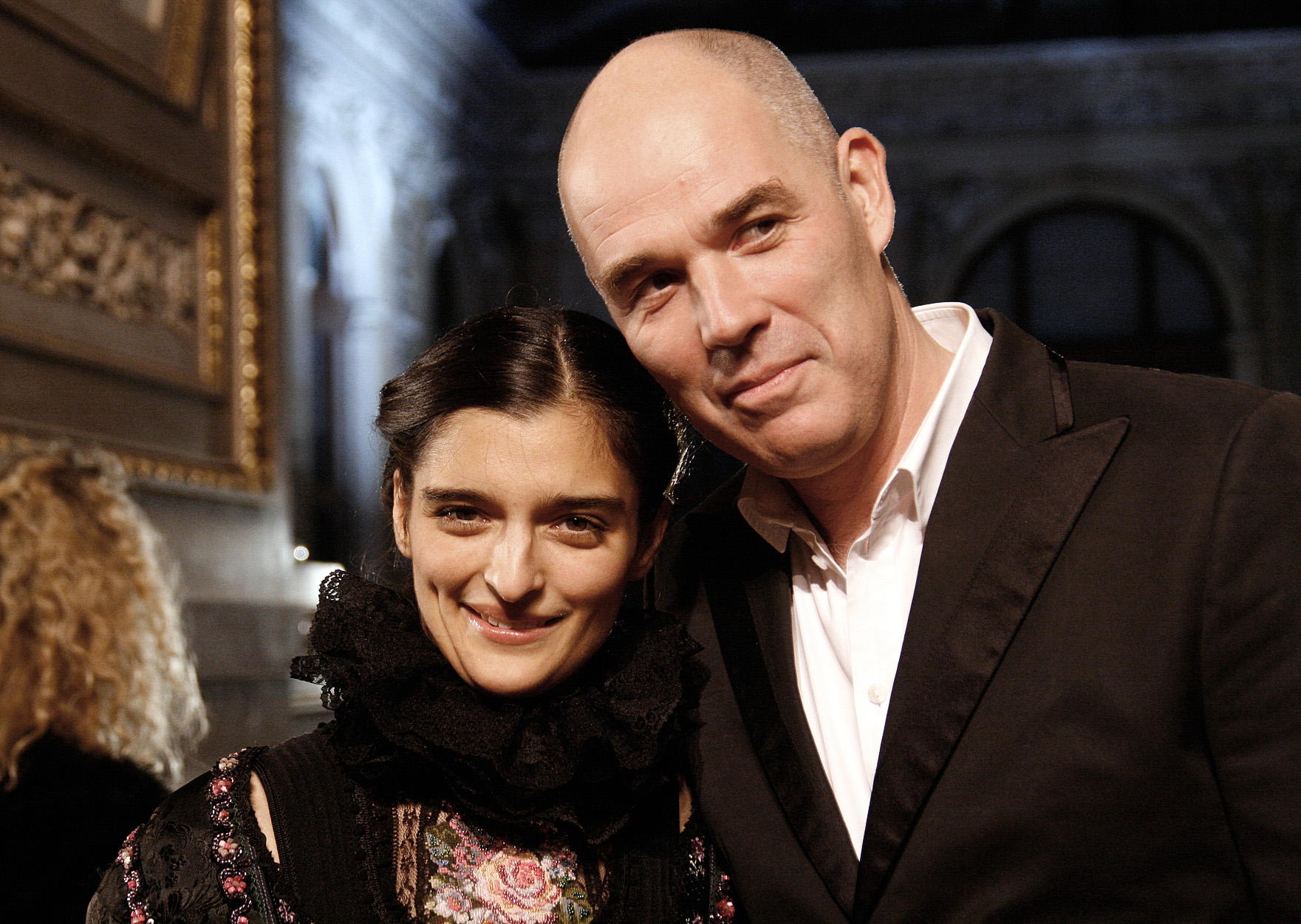 Alexandra Liedtke und Matthias Hartmann zu Gast bei der Verleihung des Nestroy-Theaterpreises 2010 im Burgtheater in Wien.